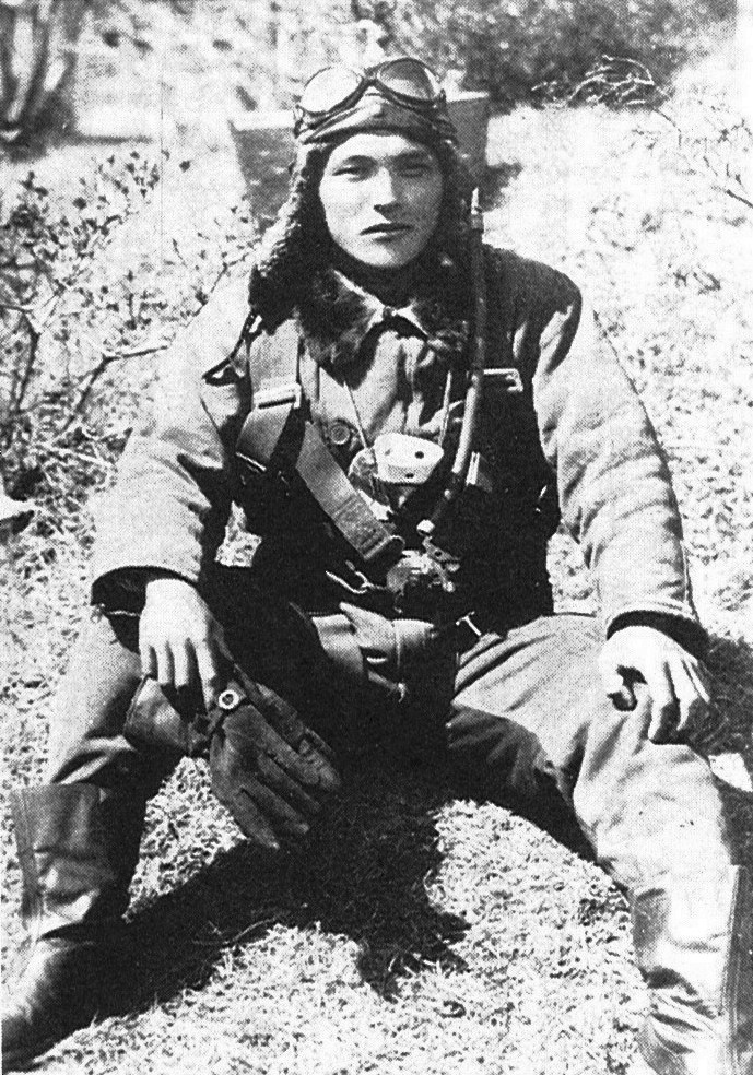 1940年11月、土浦航空隊時代。